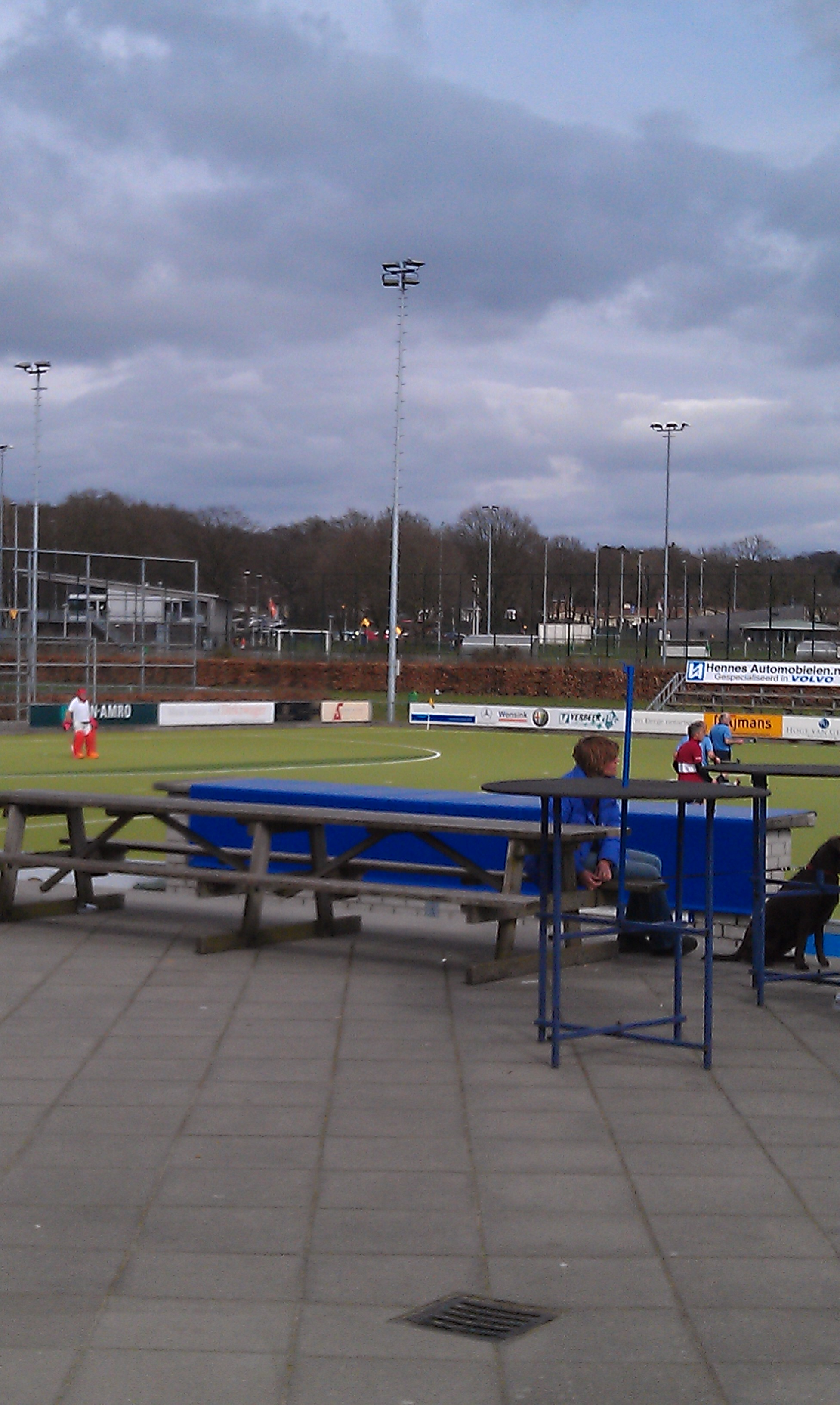 Veld 1 NMHC Nijmegen, op de achtergrond SV Orion.